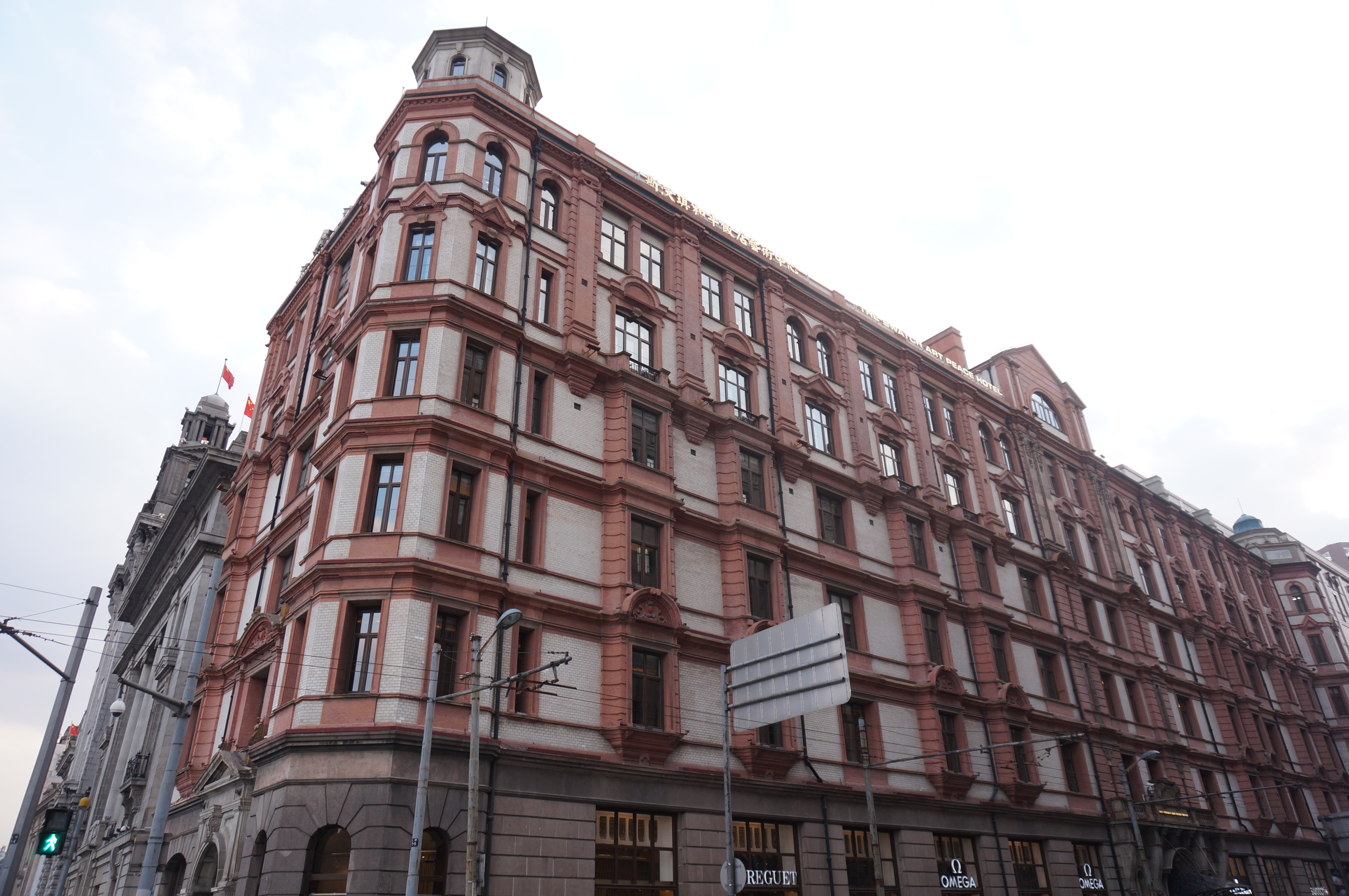 中文（中国大陆）: 汇中饭店南京东路沿街立面